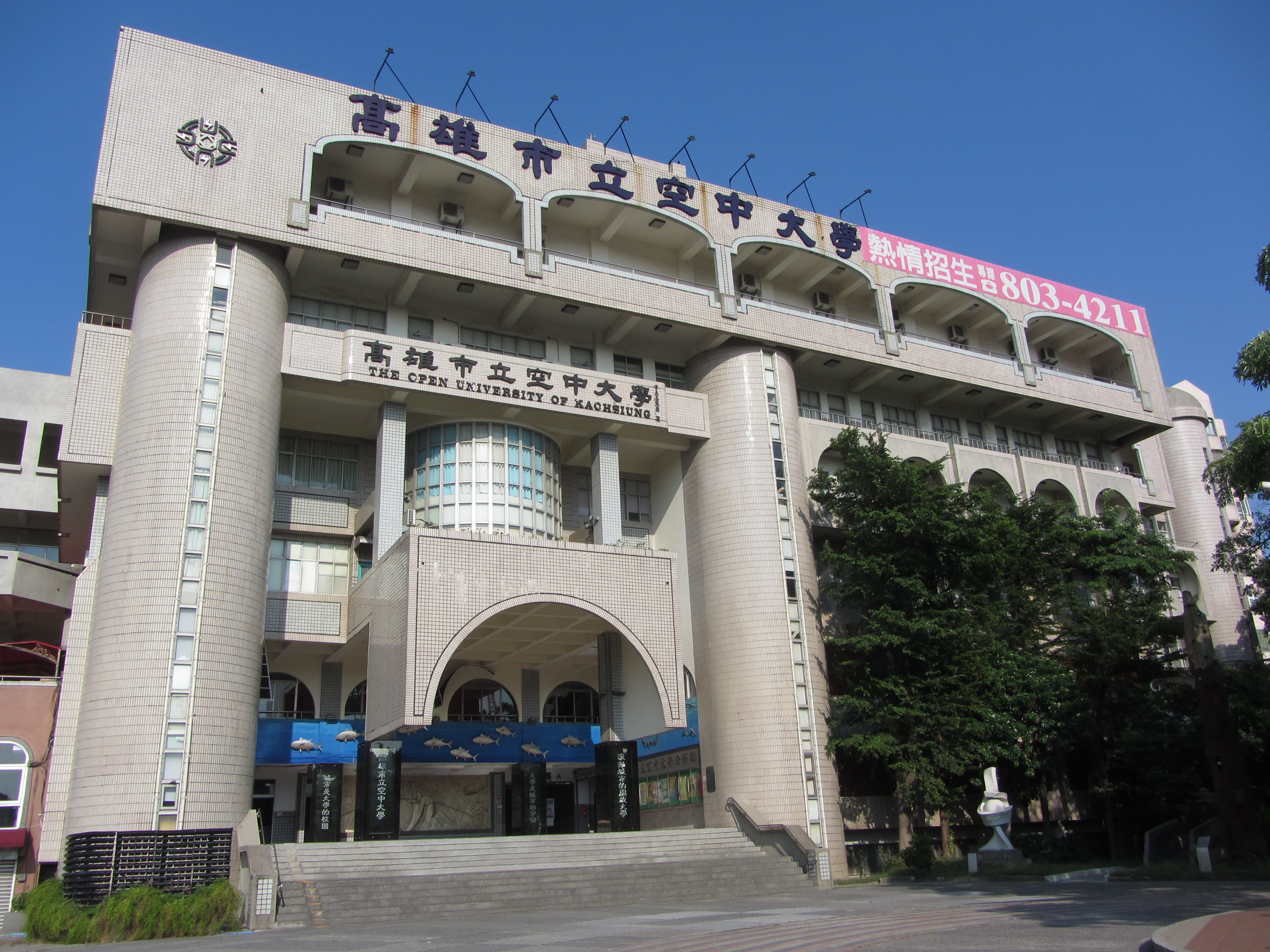 高雄市立空中大學行政大樓